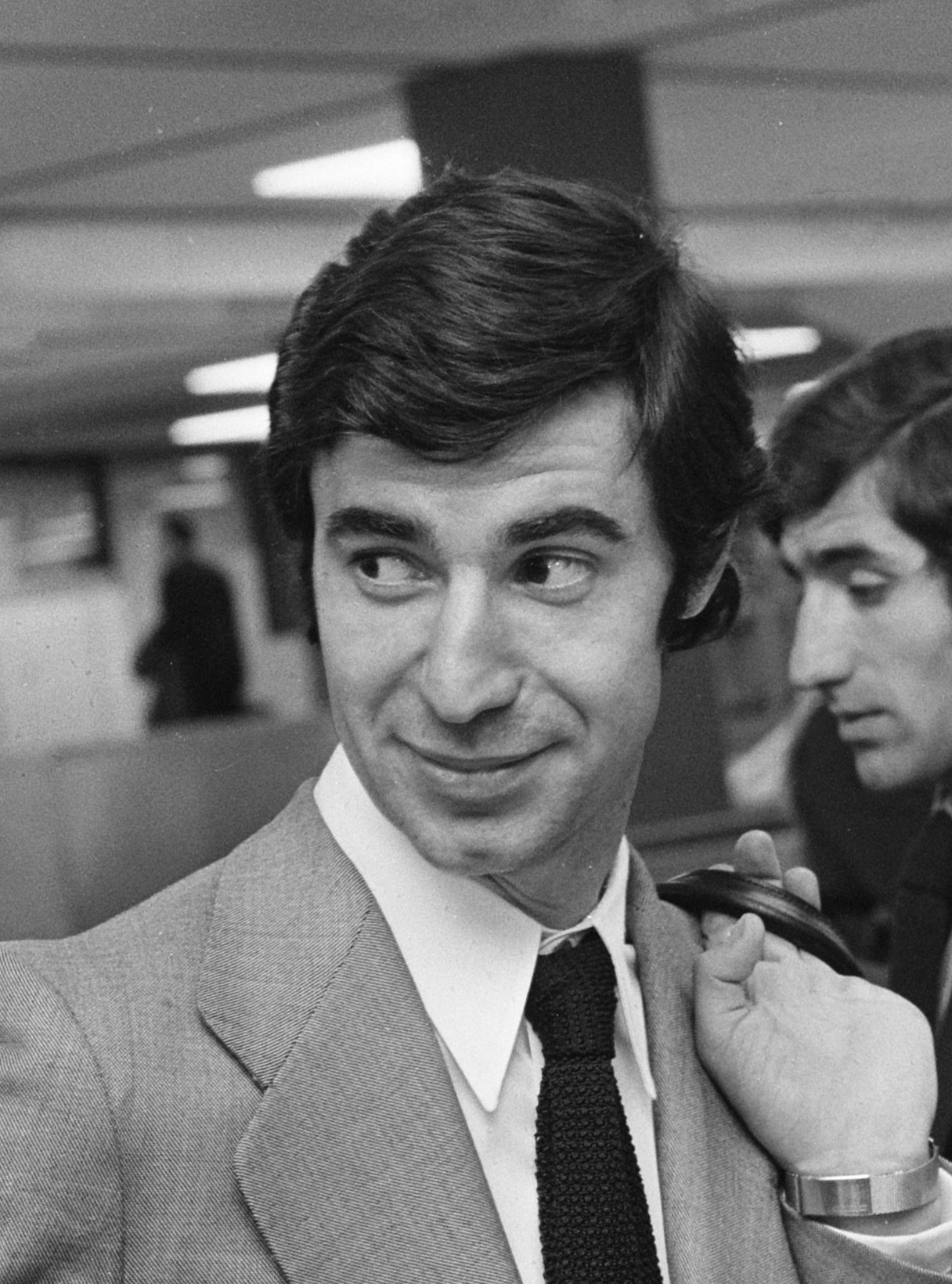 Spaans Nationaal Team op Schiphol, Garate ( Atletico Madrid )